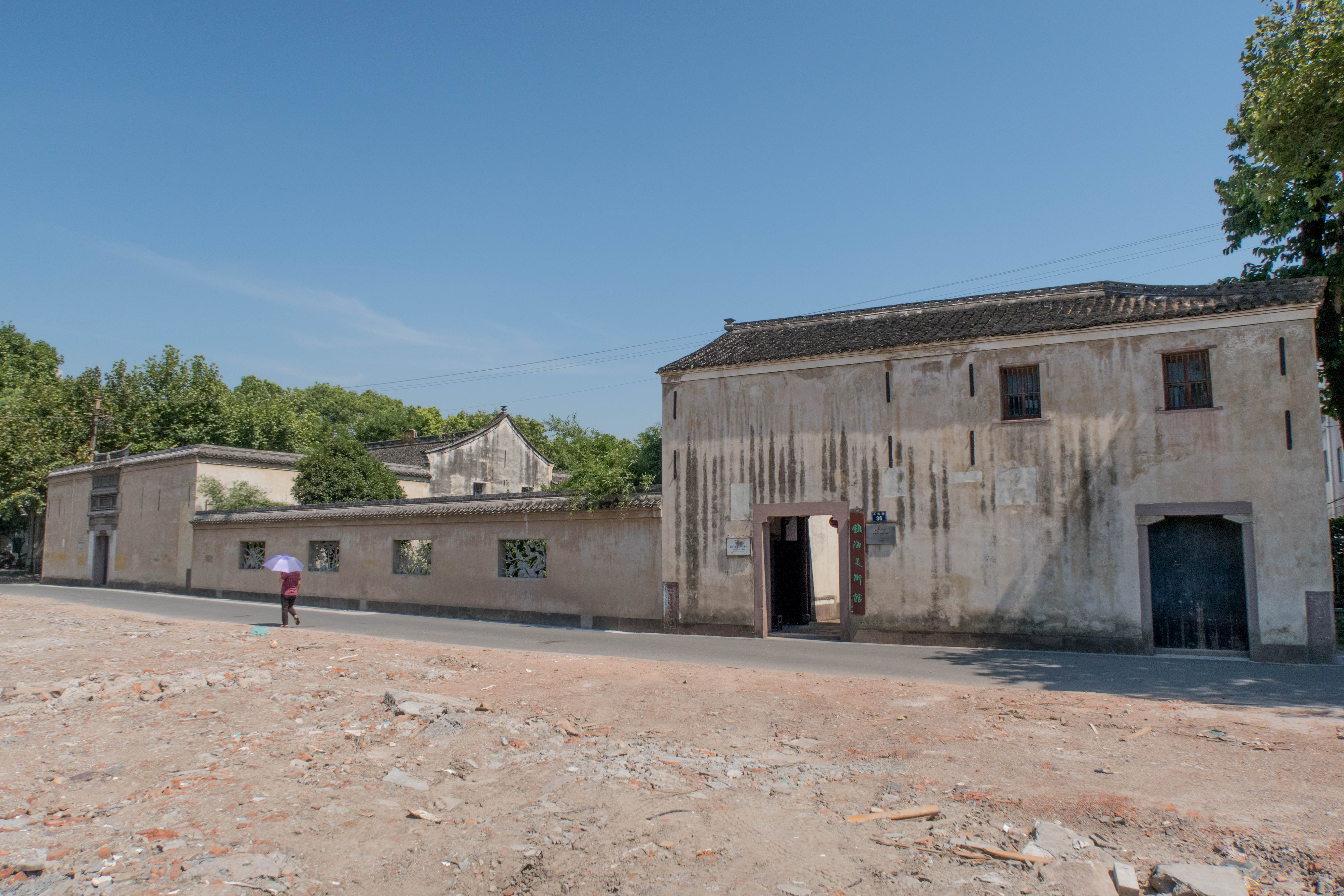 镇海吴杰故居